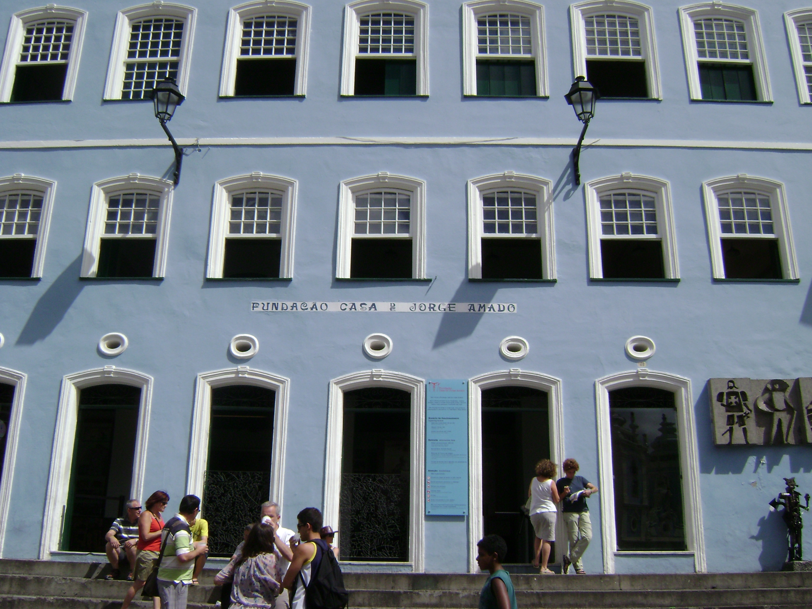 Fundação Casa Jorge Amado, em Salvador, Bahia, Brasil.